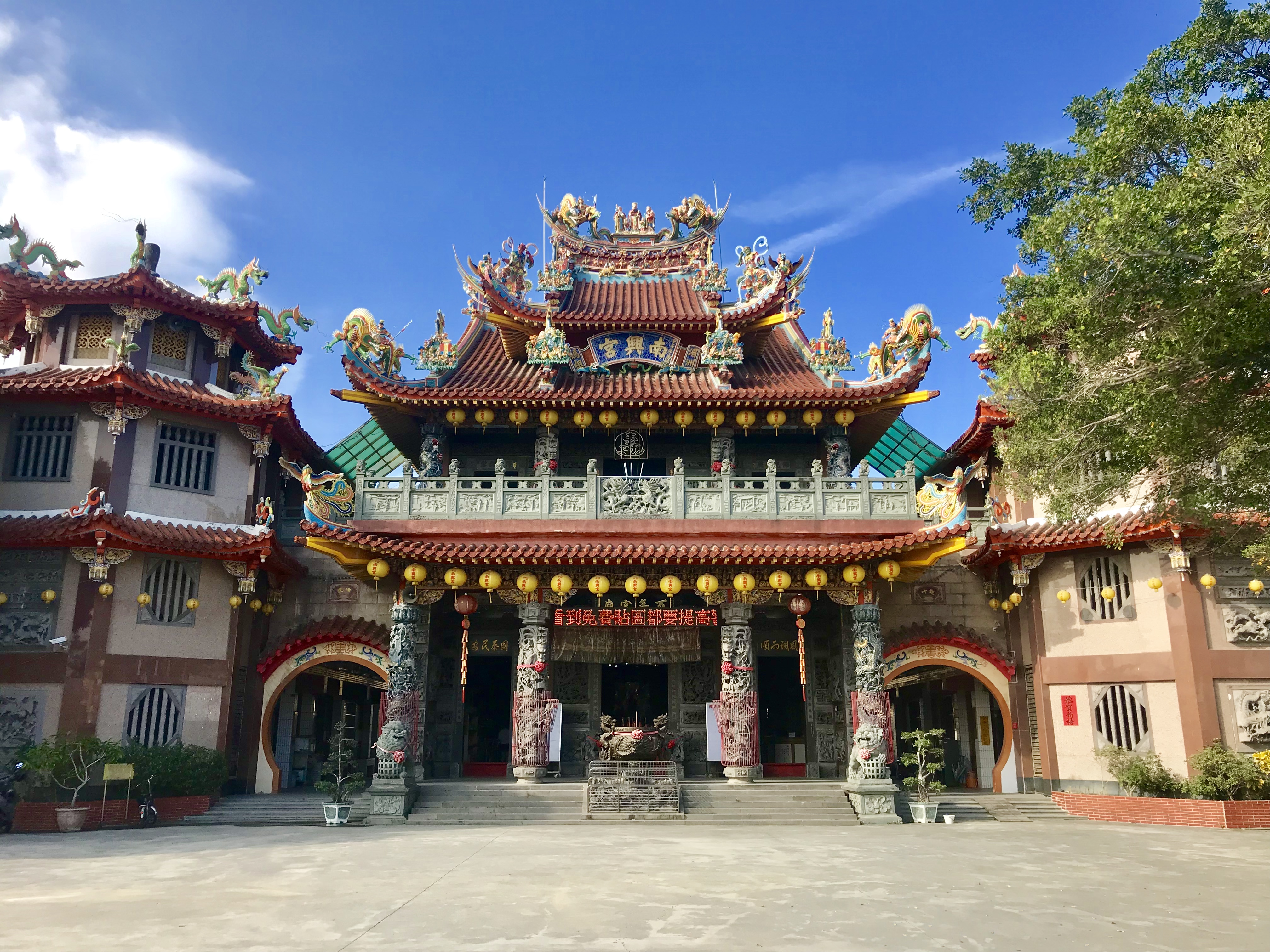 舊社南興宮正面照